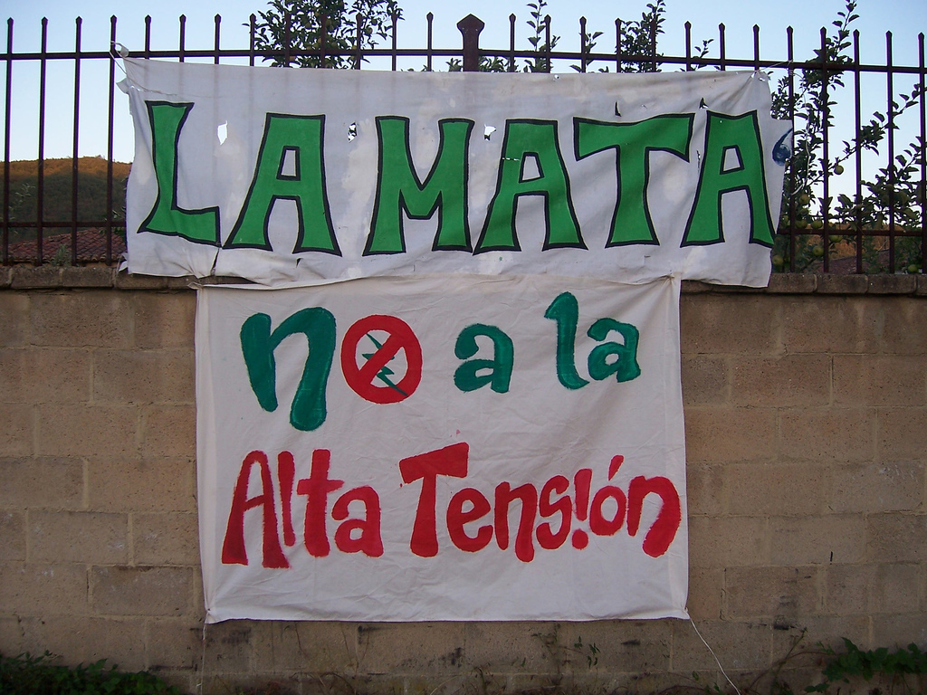 Reivindicacion contra la alta tensión de la línea Lada–Velilla, Agosto 2005